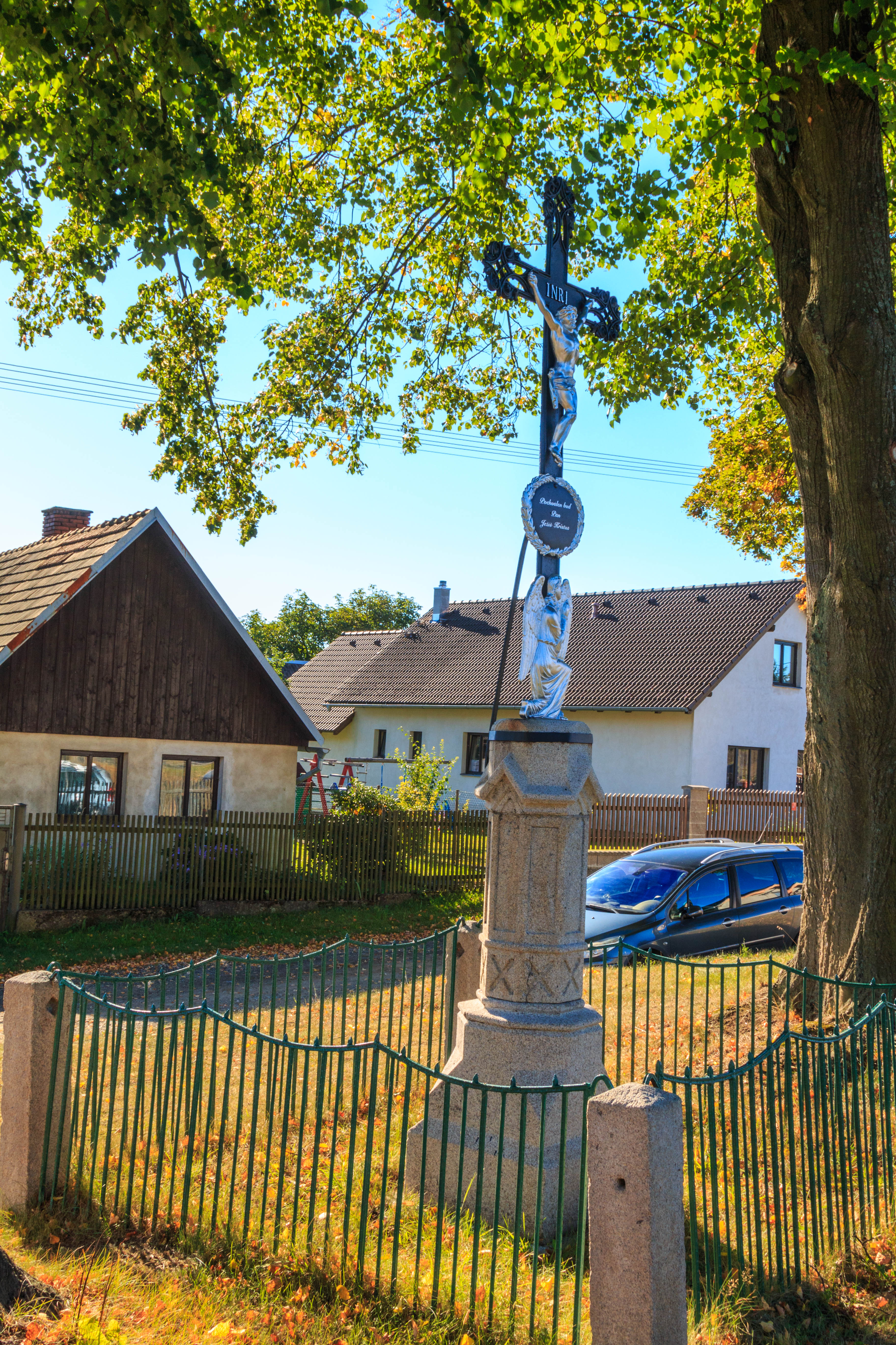 Vrbka u Kozlova - křížek